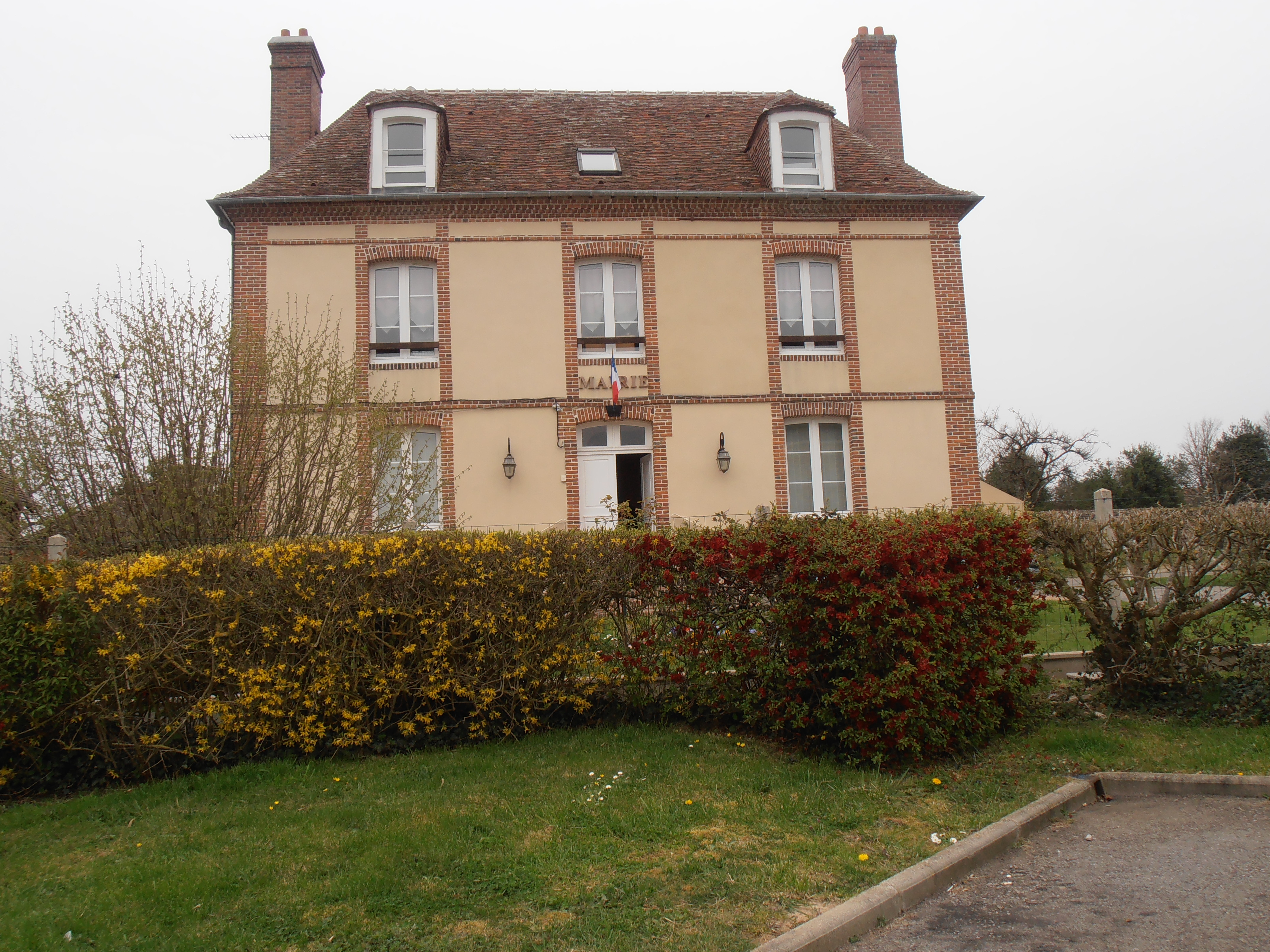 Saint-Martin-d'Ecublei, Orne, mairie